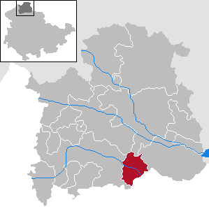 Gemeinde Kleinfurra in Thüringen, Landkreis Nordhausen